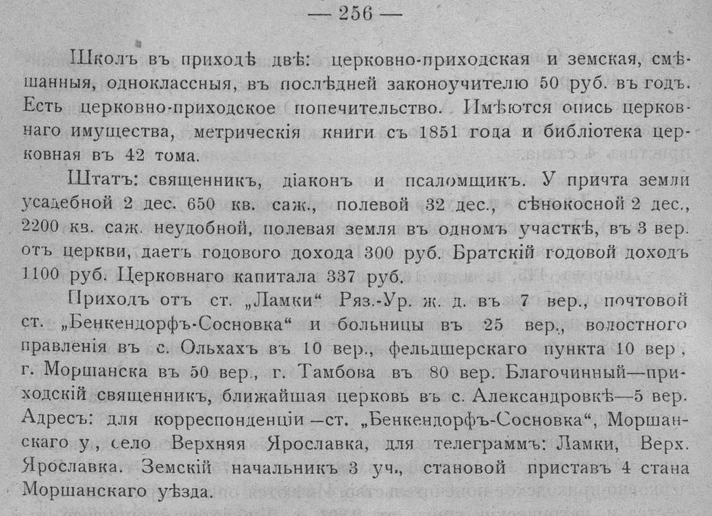 Историко-статистическое описание Тамбовской епархии, Верхняя Ярославка, 3-й Моршанский Мамонтовский округ